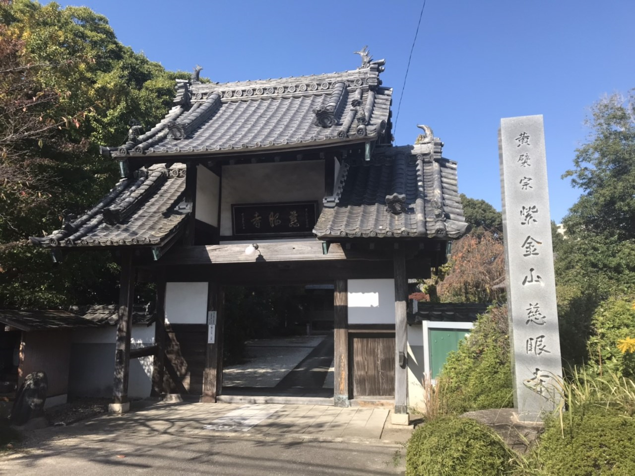 愛知県春日井市鳥居松町の慈眼寺の表門